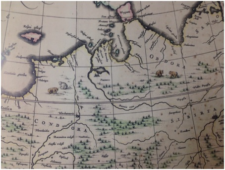 Карта России или Московии, северная и восточная части. Russiae, vulgo Moscovia dictae, Partes Septentrionalis et Orientalis. Auctore Isaaco Massa. Карта Блау, составленная по заметкам Исаака Массы для Theatrum Orbis Terrarum, sive Atlas Novus. Часть с изображением медведей.